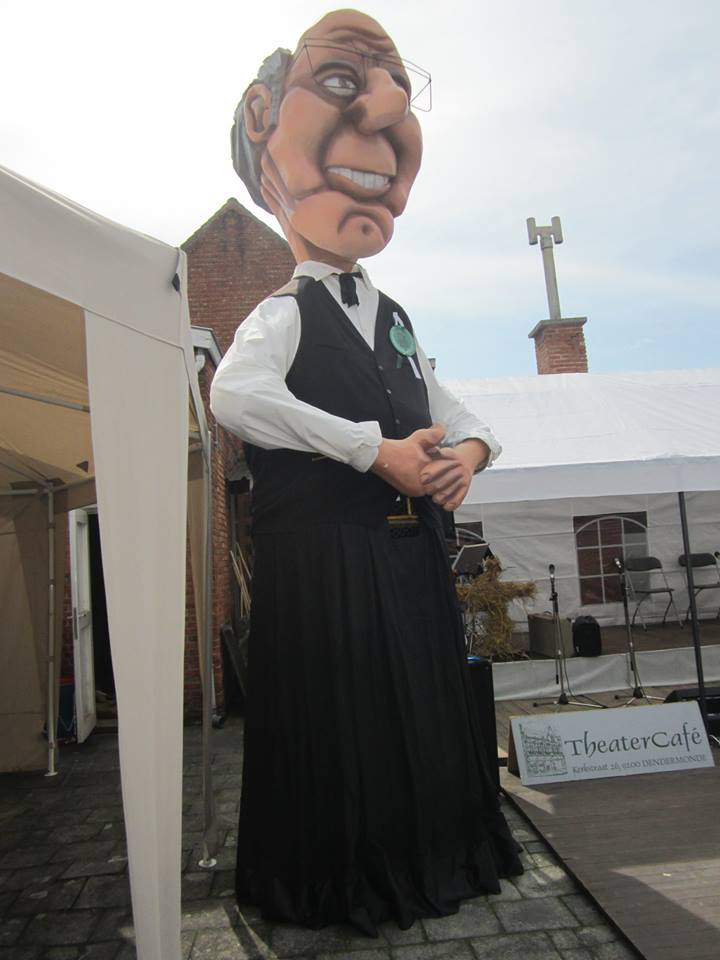 Reus Gust van Reynout